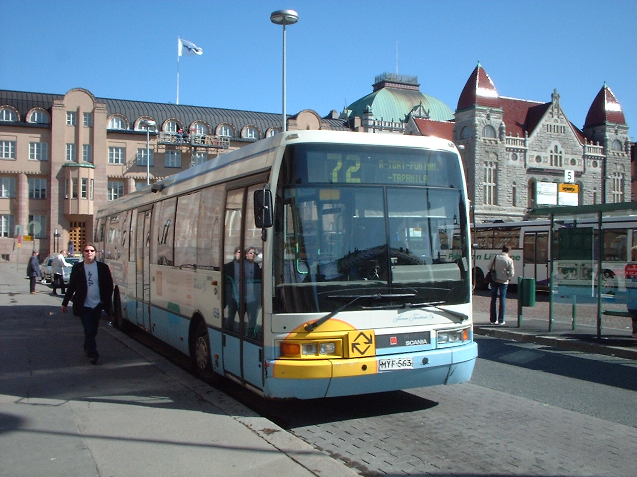 STA 72 Rautatientorilla